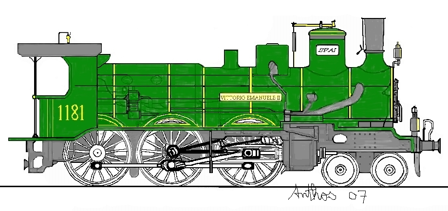 Disegno di una locomotiva